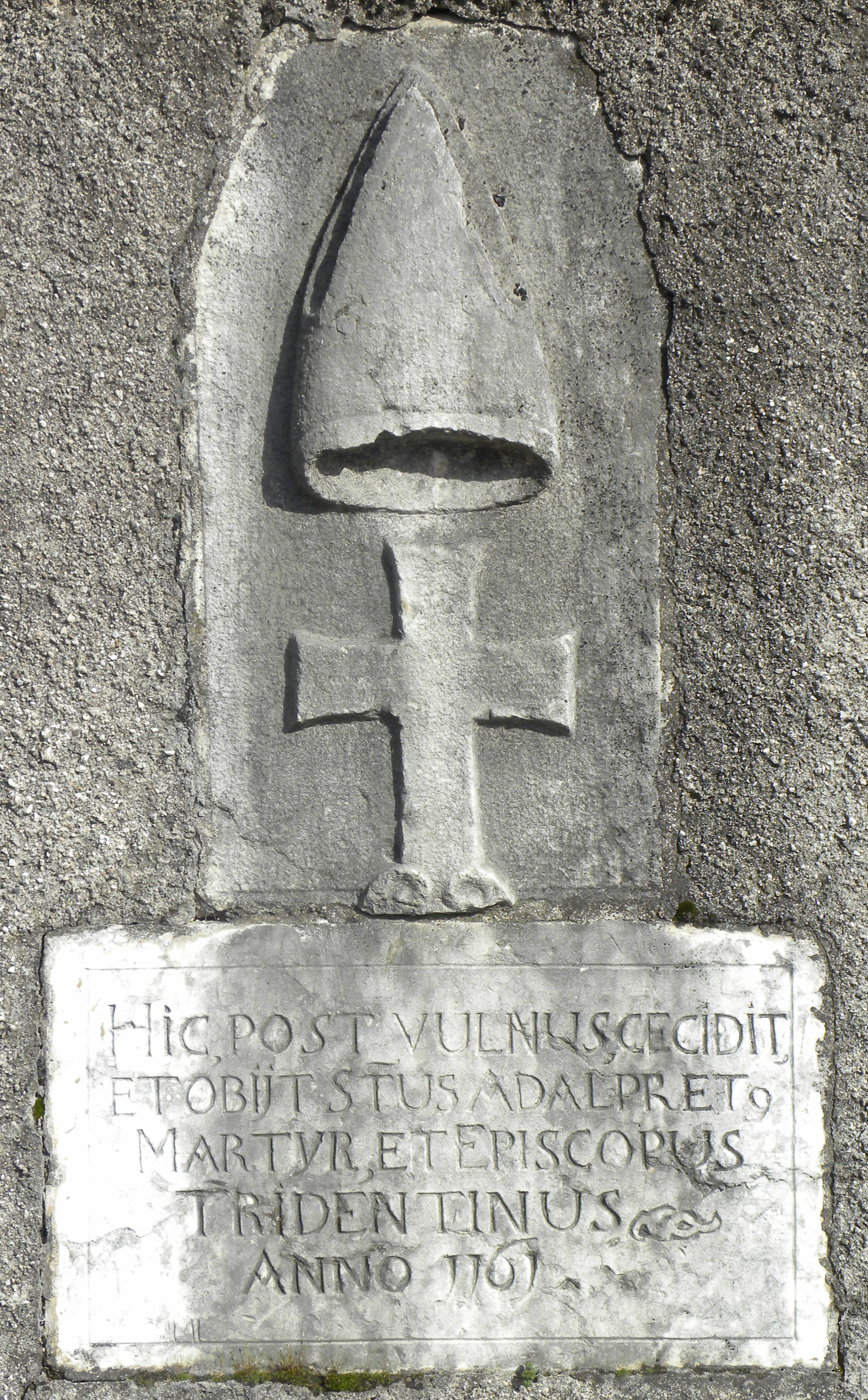 lapide dedicata al vescovo Adalpreto